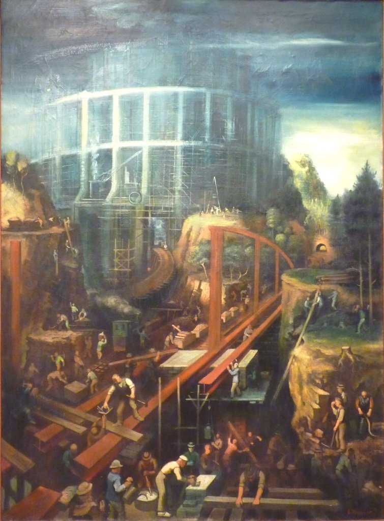 Titel: Turmbau. Öl auf Leinwand. Maße: 1685 x 1237 mm